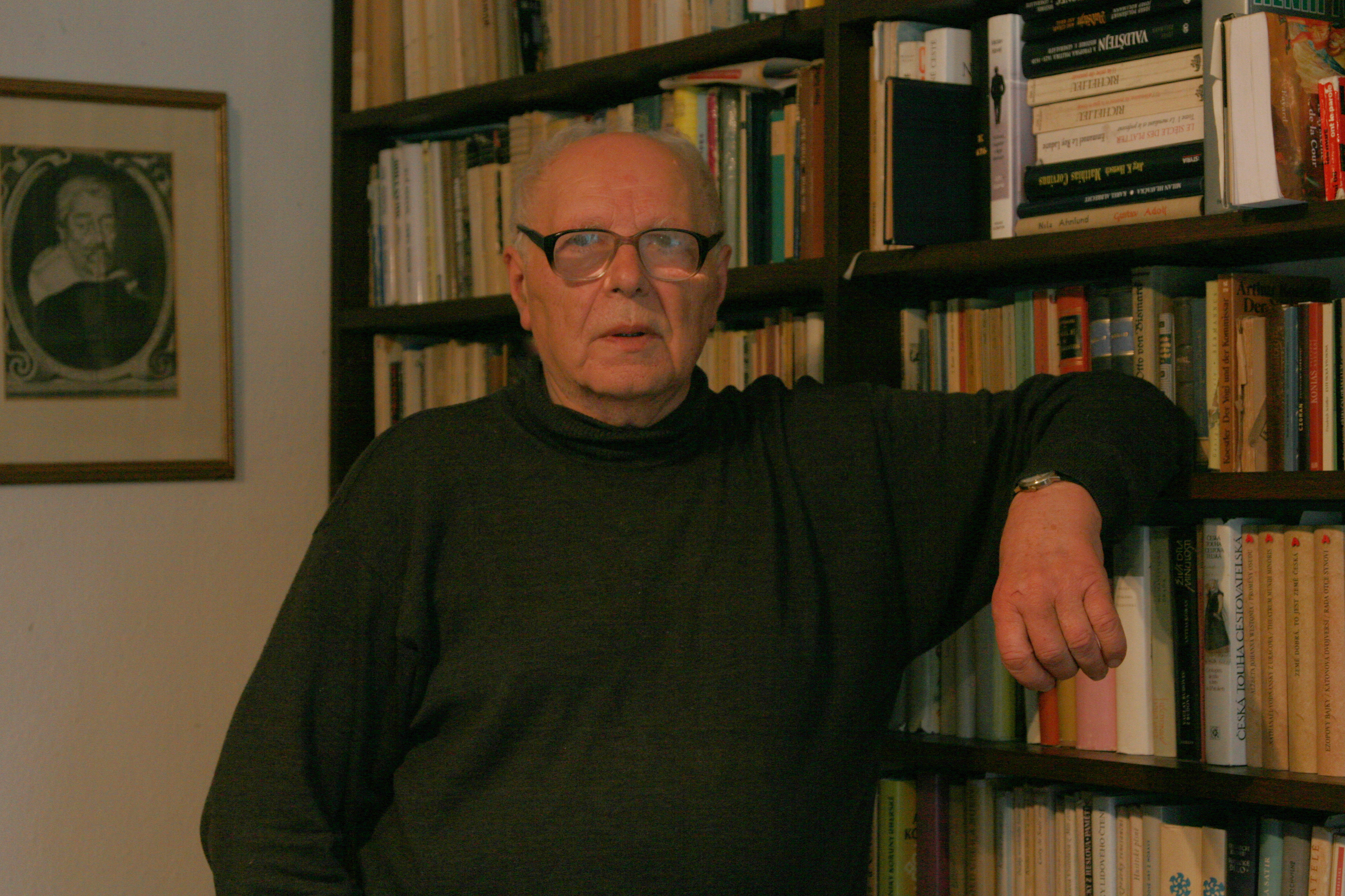 Historik Josef Válka.